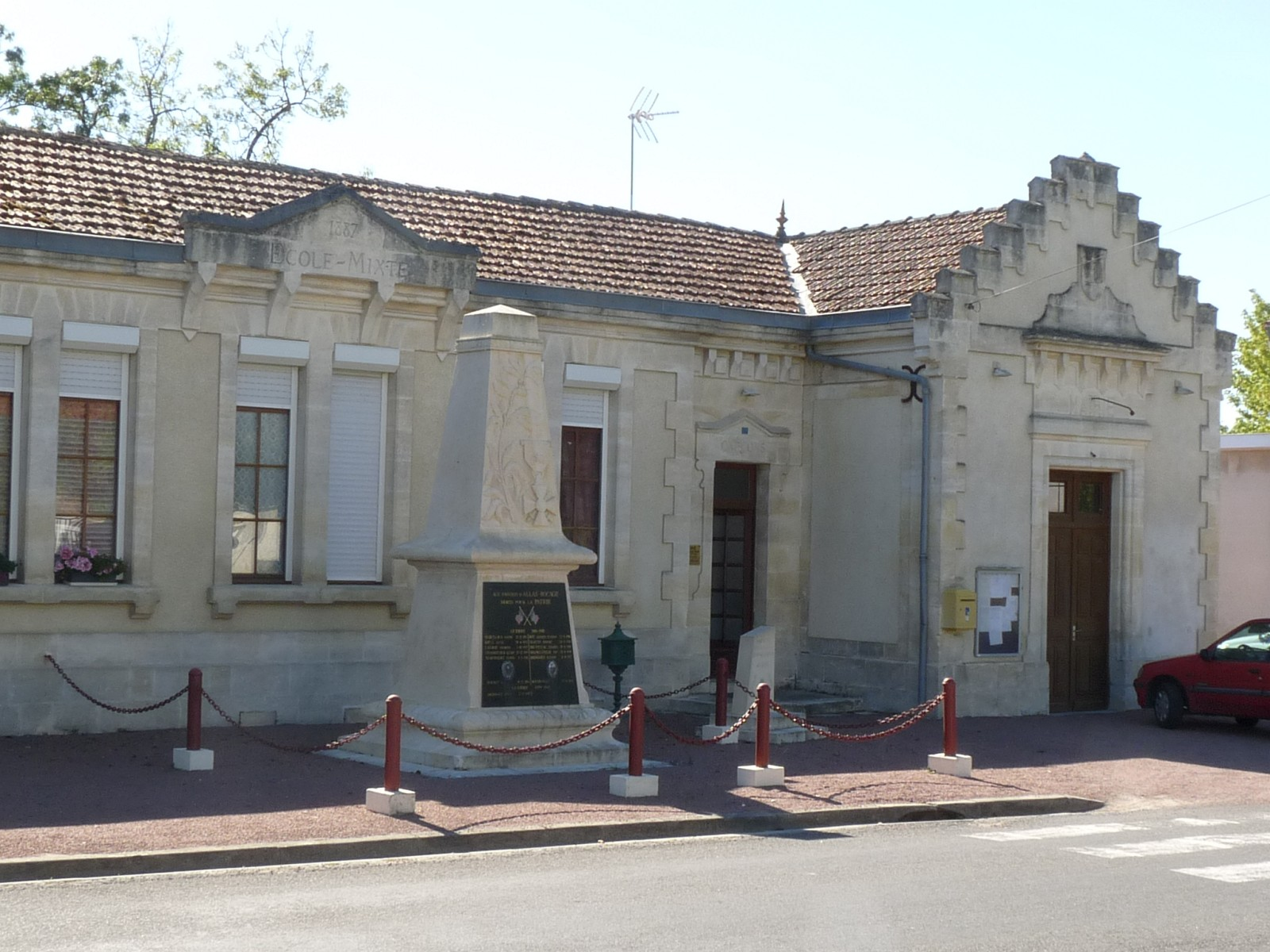 Mairie d'Allas-Bocage, Charente-Maritime, France